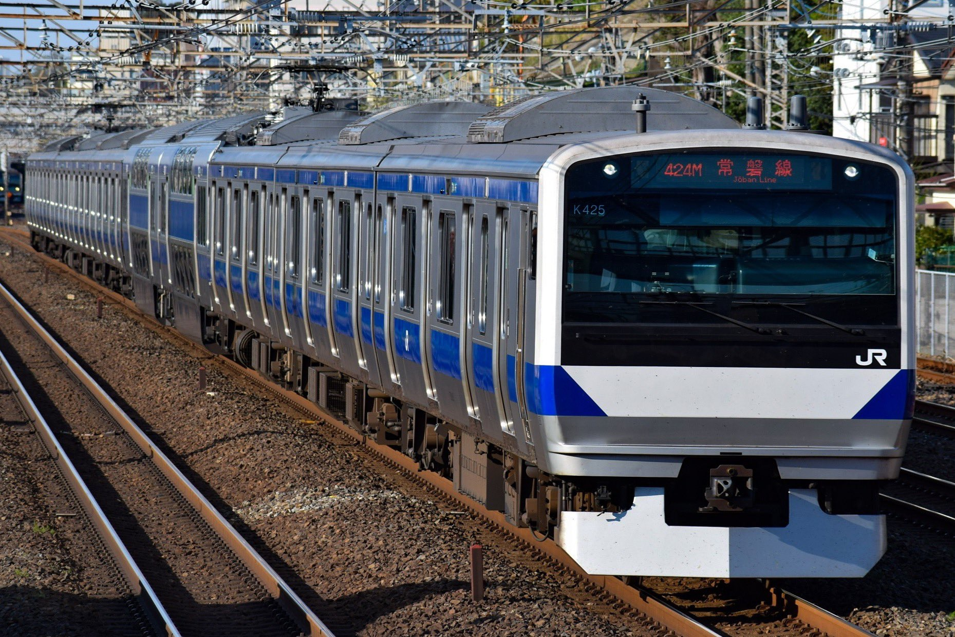 常磐快速線を走行するE531系0番台カツK425編成(普通上野行)